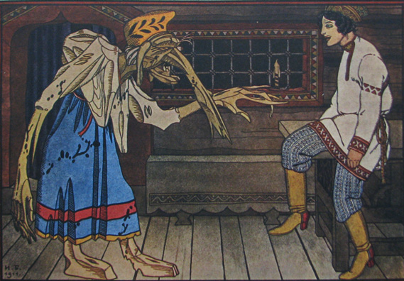 И. Я. Билибин "Тут с веселою душою попрощался он с Ягою" Иллюстрация к "Сказке о трех царских дивах и об Ивашке, поповском сыне" А. С. Рославлева. 1911 г